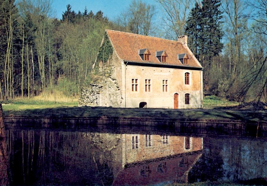 chateau Trois Fontaines Auderghem Belgium